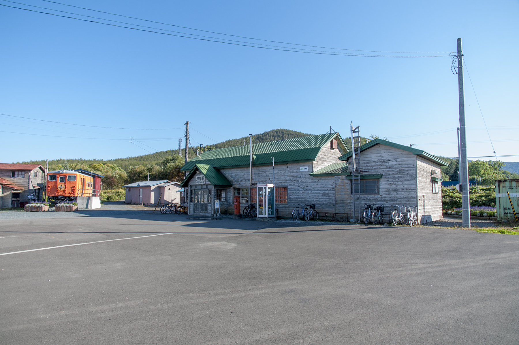 北海道旅客鉄道株式会社根室本線幾寅駅